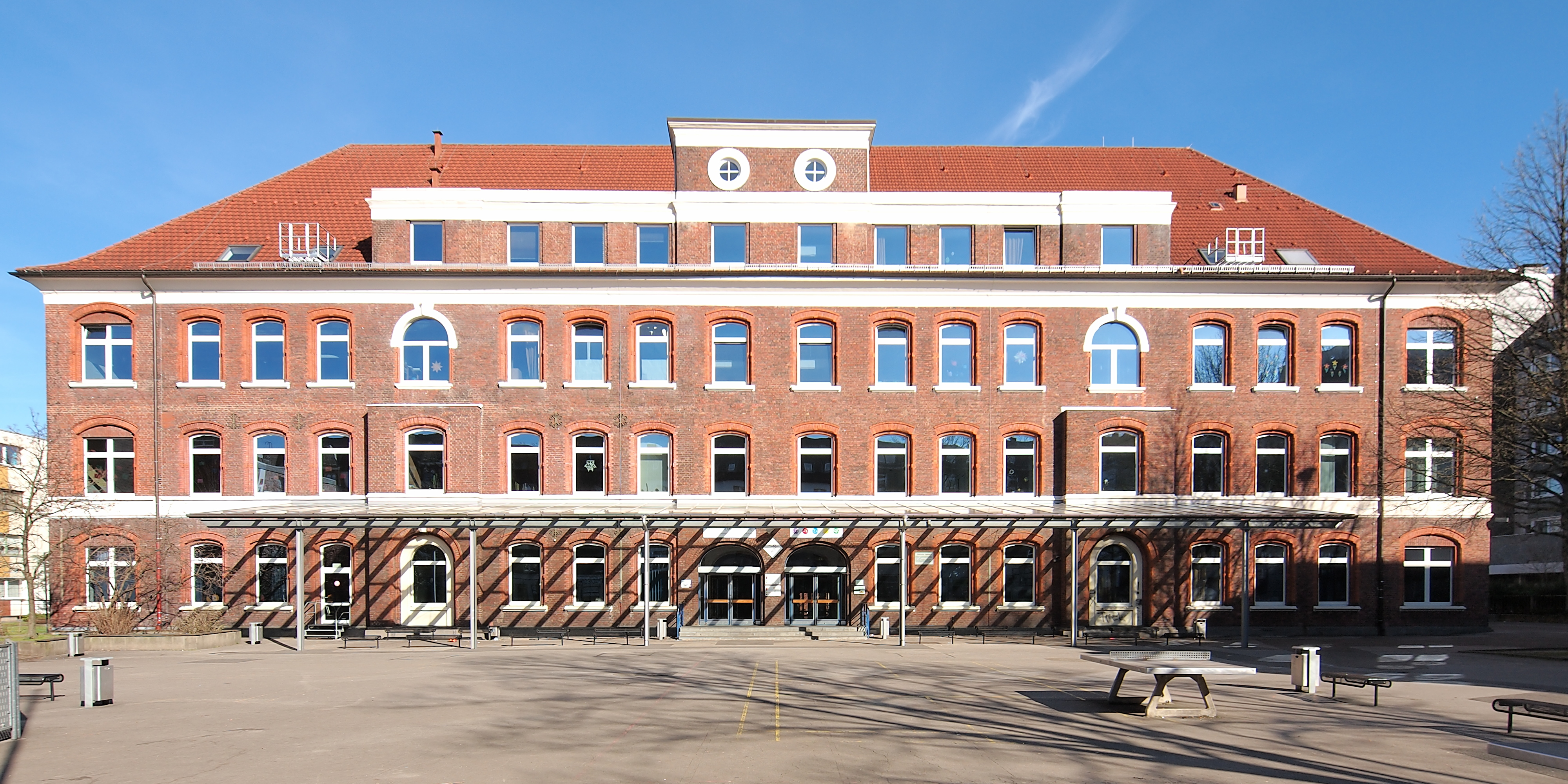 Hans-Tilkowski-Schule, Hauptschule in Herne Mitte, Schulgebäude, benannt nach dem Fußballspieler Hans Tilkowski Seit 2018 "Grundschule Kunterbunt" durch Zusammenlegung der Grundschule Berliner Platz mit den Klassen ihres Teilstandorts Schulstraße.